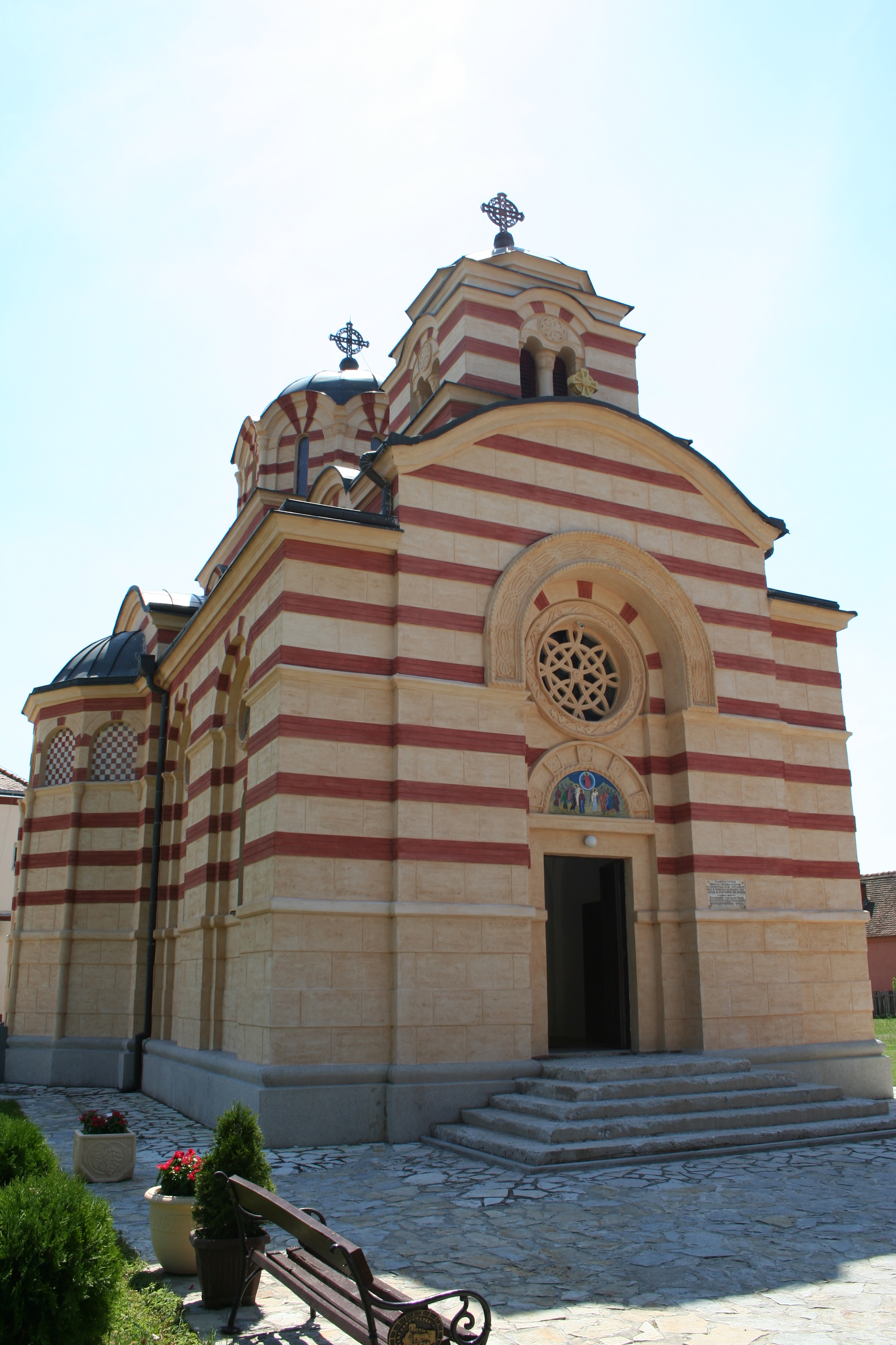 Crkva-spomen kosturnica Vaznesenja Gospodnjeg, Dublje